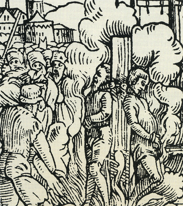 Holzschnitt-1553-Schrift-Ludwig-Rabus (Rabe)